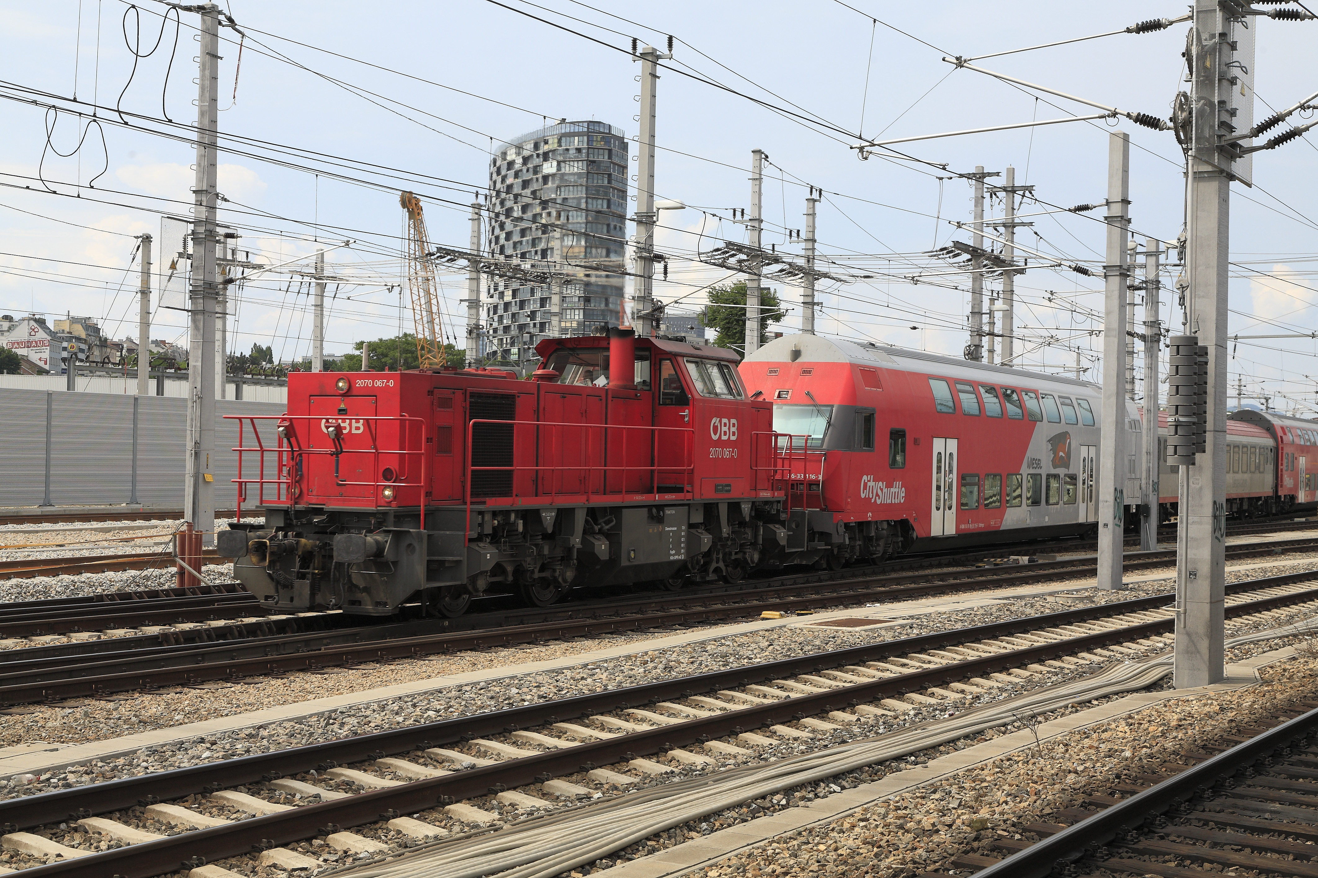 Rangierlokomotive G 800 von Vossloh bzw MaK beim ÖBB-Wartungszentrum Wien-Matzleinsdorf. Die Maschinen, in Deutschland als Reihe (1)278 eingeordnet, ähneln den G 1206, jedoch sind sie mit 72 Tonnen etwas leichter.